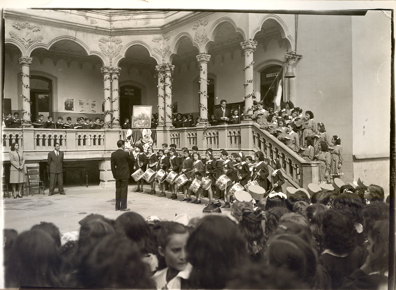 Fundación del Colegio Hebreo Monte Sinai, en Zacatecas 120, colonia Roma, actual sede de la Universidad de la Comunicación.